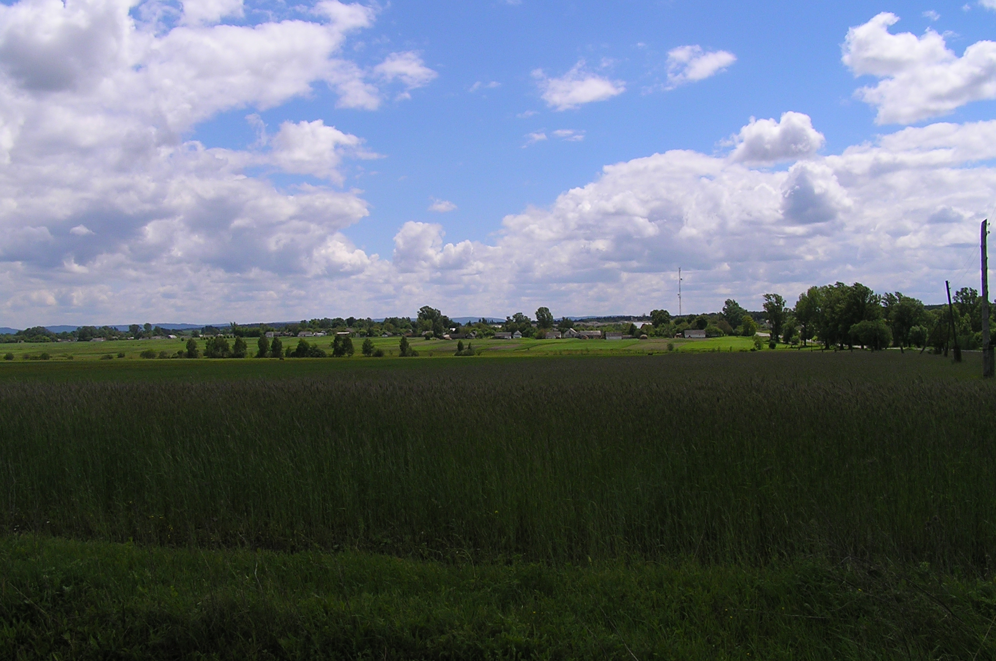 Стовпець